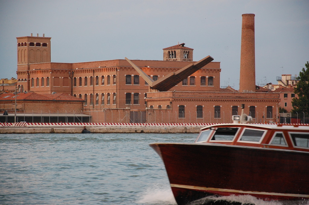 Nice Sunset Area, Venice, Italy